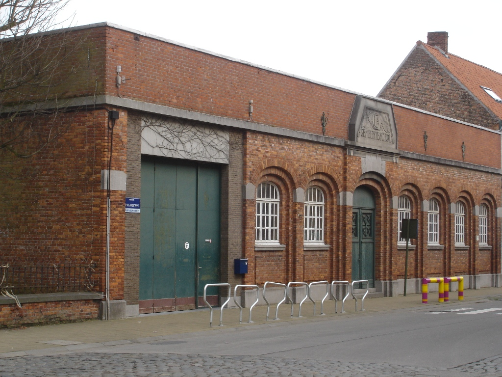 Gevel van de voormalige jongensschool. Nu zitten hier de laatste 3 jaren van het lager onderwijs van school 'De Graankorrel' gevestigd.